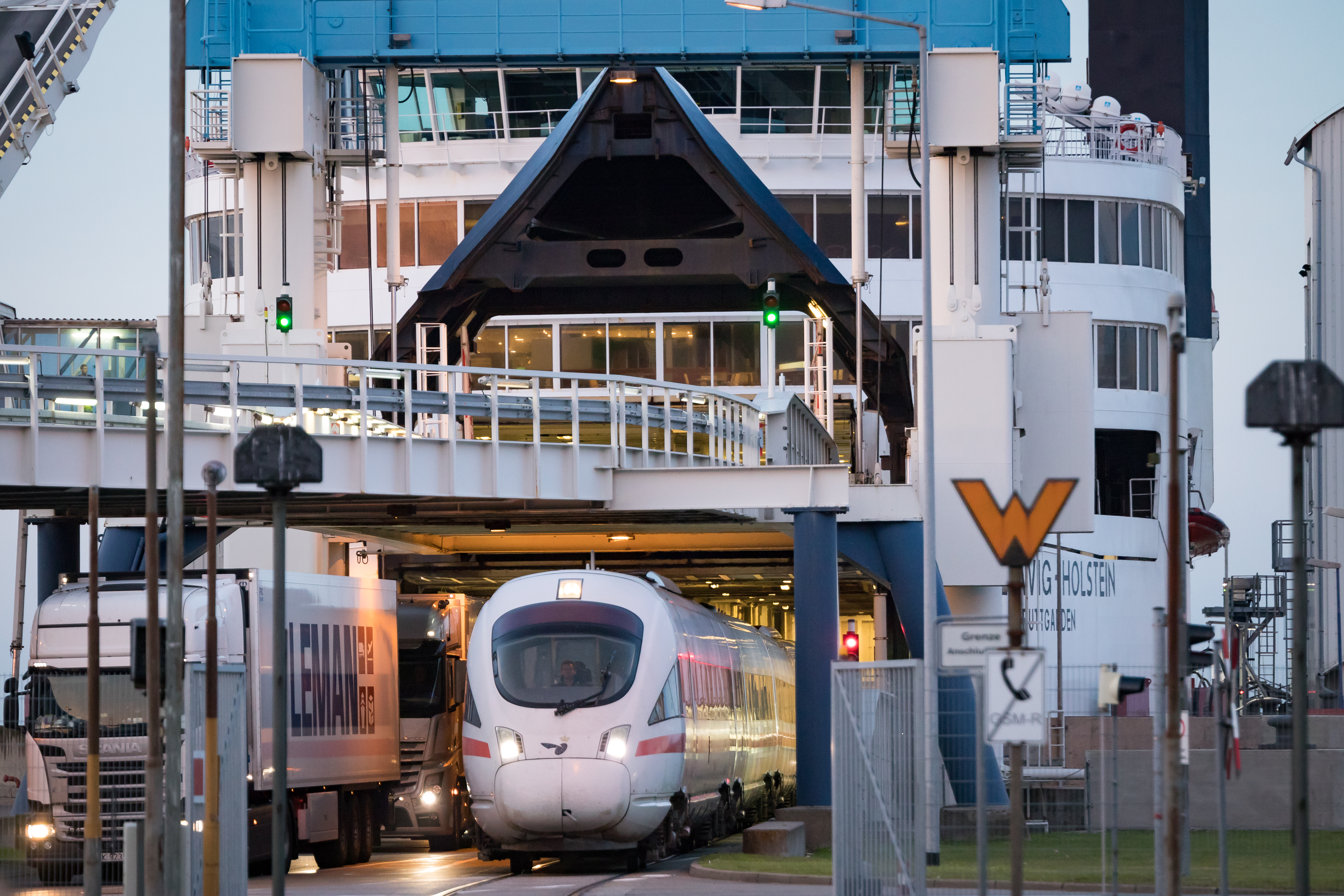 ICE ICE TD von Kopenhagen nach Hamburg verlässt das Fährschiff Schleswig Holstein am Fährhafen Puttgarden